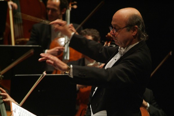 Carles Coll i Costa